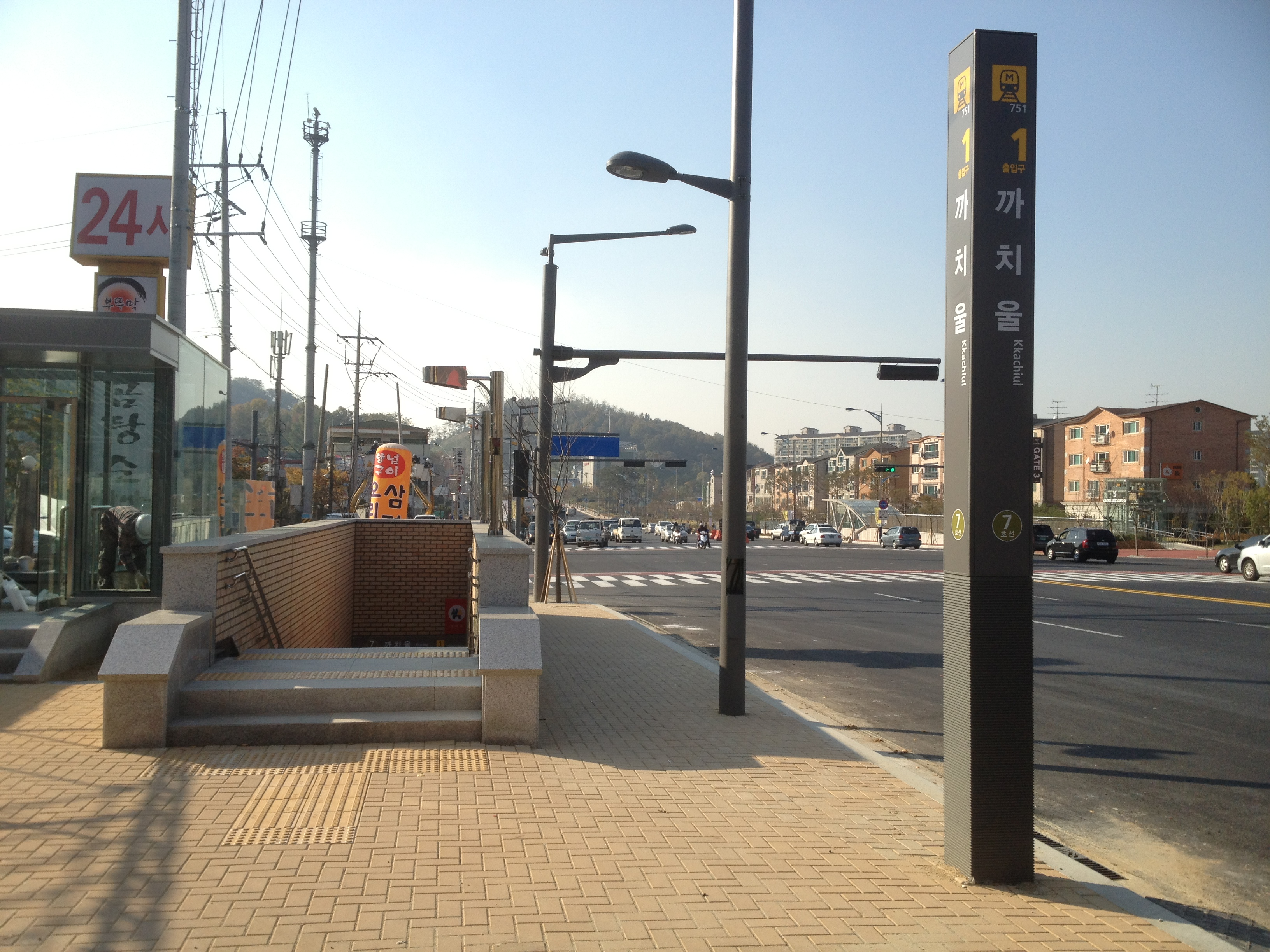 서울특별시 도시철도공사 7호선 까지울역 1번출입구